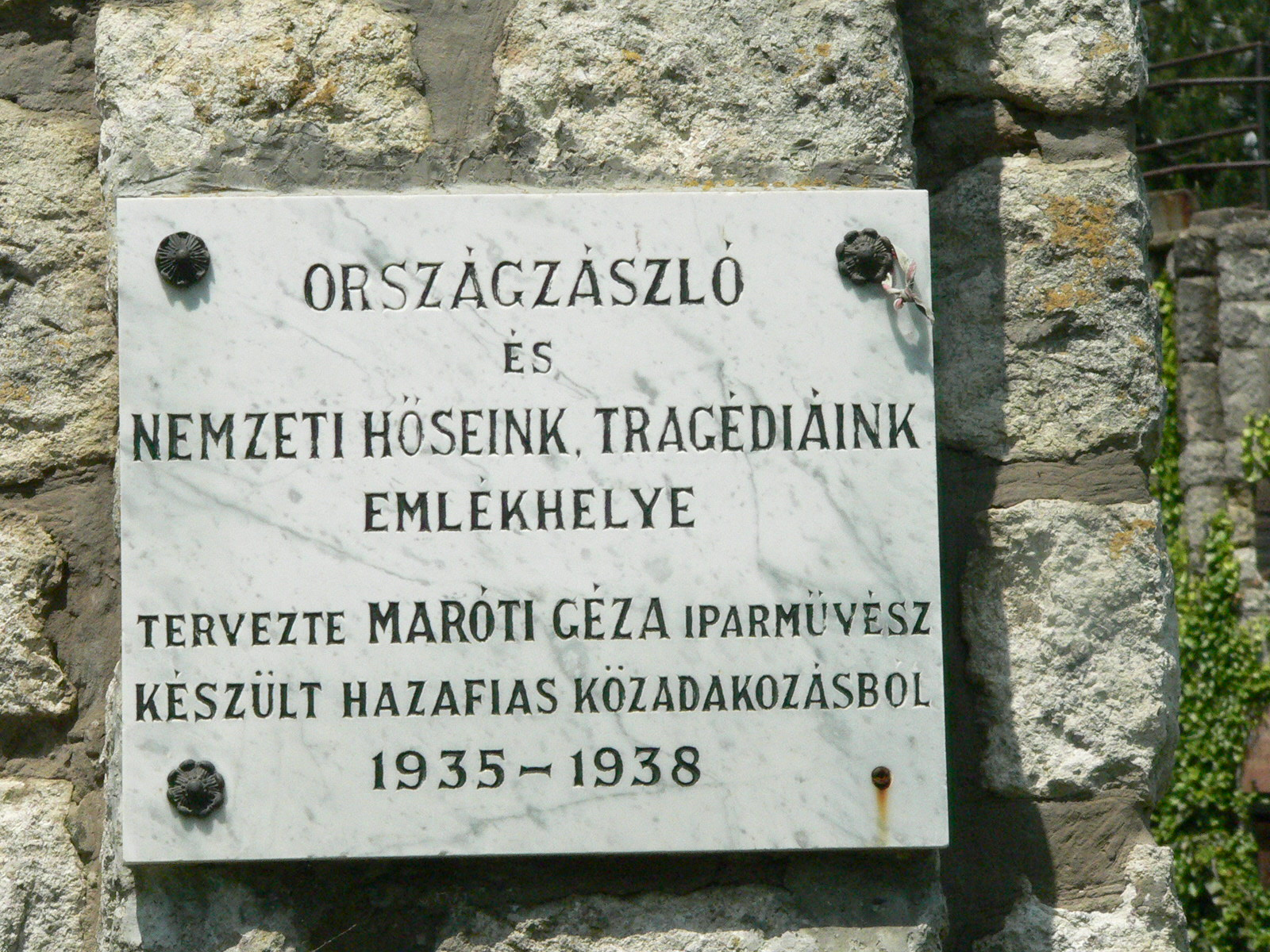 Zebegény, Országzászló és hősi emlékhely, a tervező Maróti Géza emléktáblája